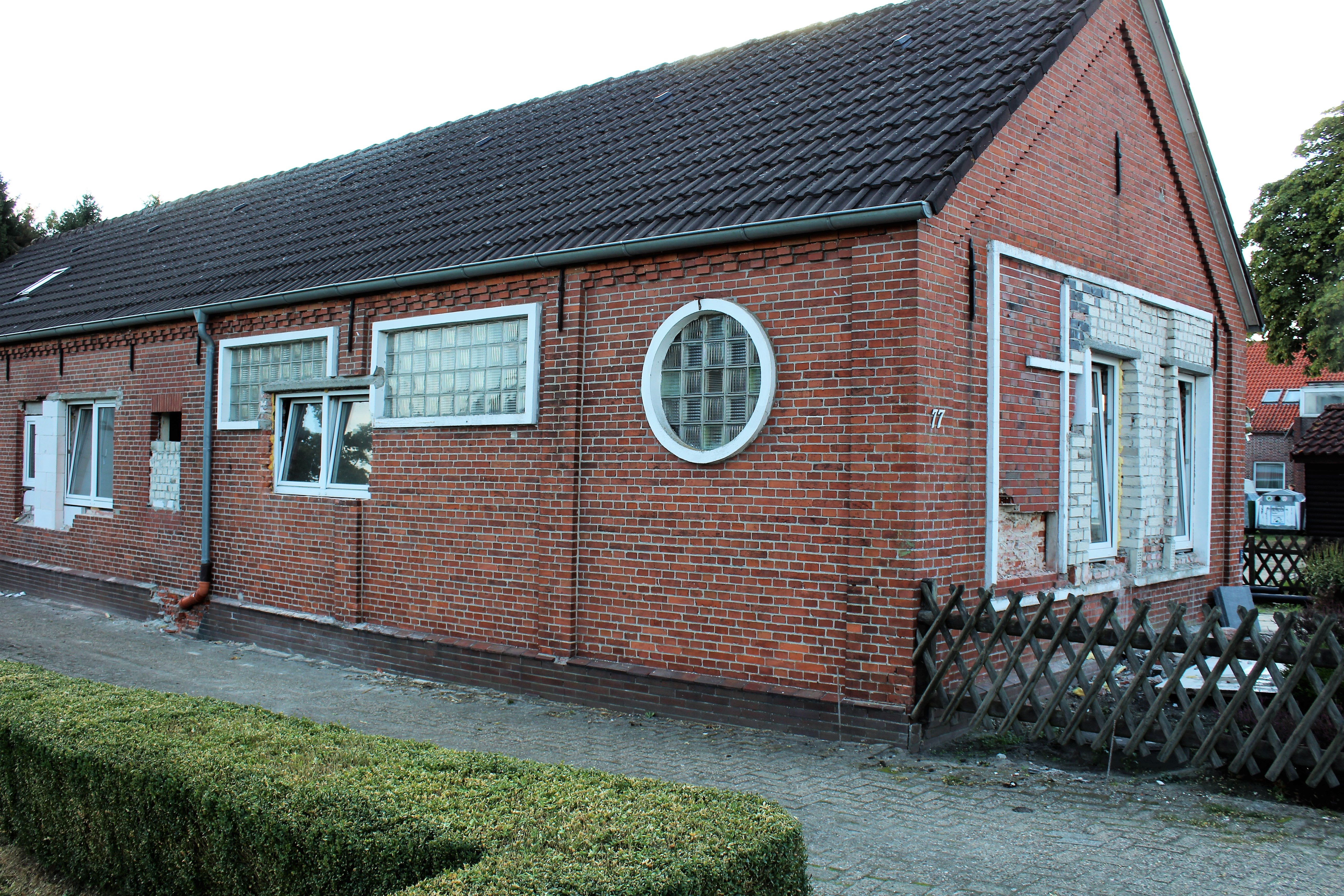 Ehemalige Friedenskapelle Wymeer, Landkreis Leer, Niedersachsen, Deutschland